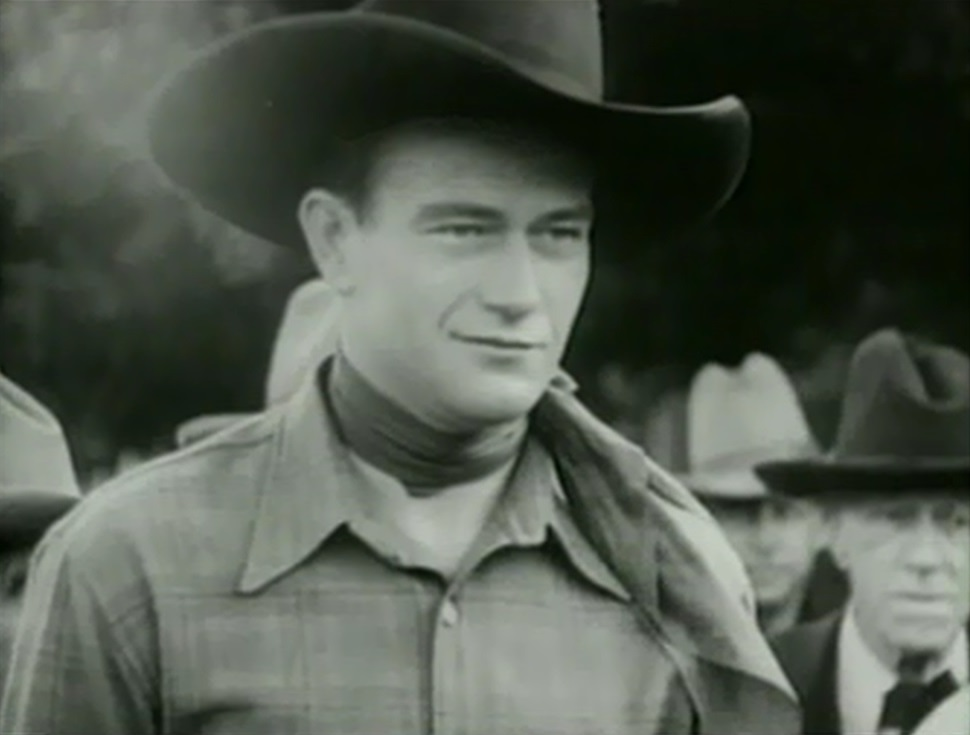 El actor estadounidense John Wayne en una escena de la película Jinetes del destino.